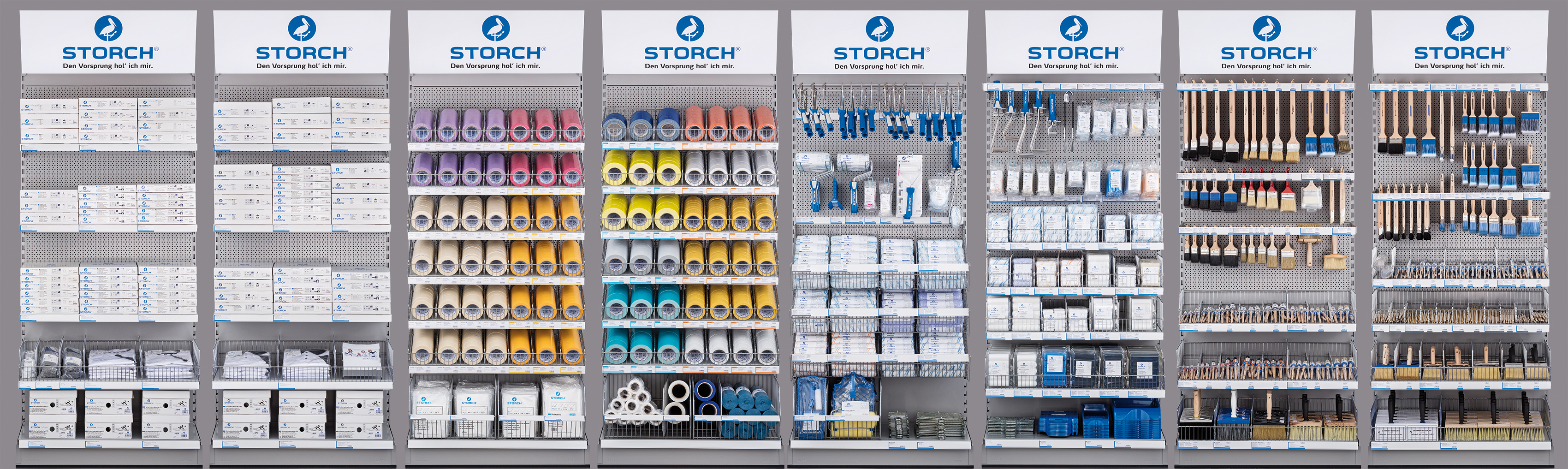 STORCH-Produktwand